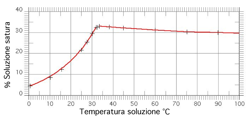 Solubilità del sistenma Na2SO4-H2O Autore : R. Castelnuovo (io)